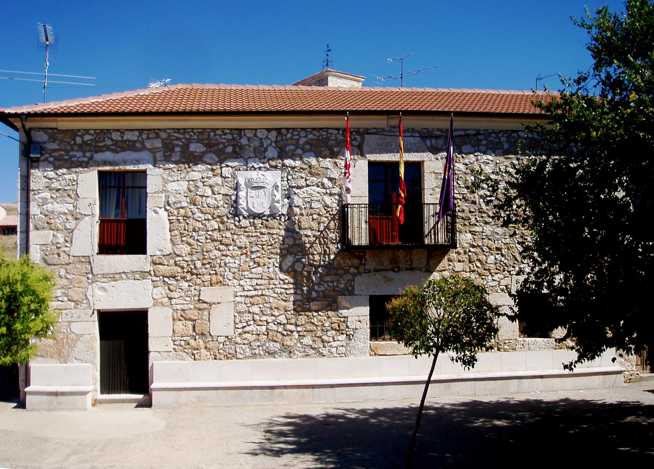 Stadtrat Fuentelisendo (Burgos, Spanien)